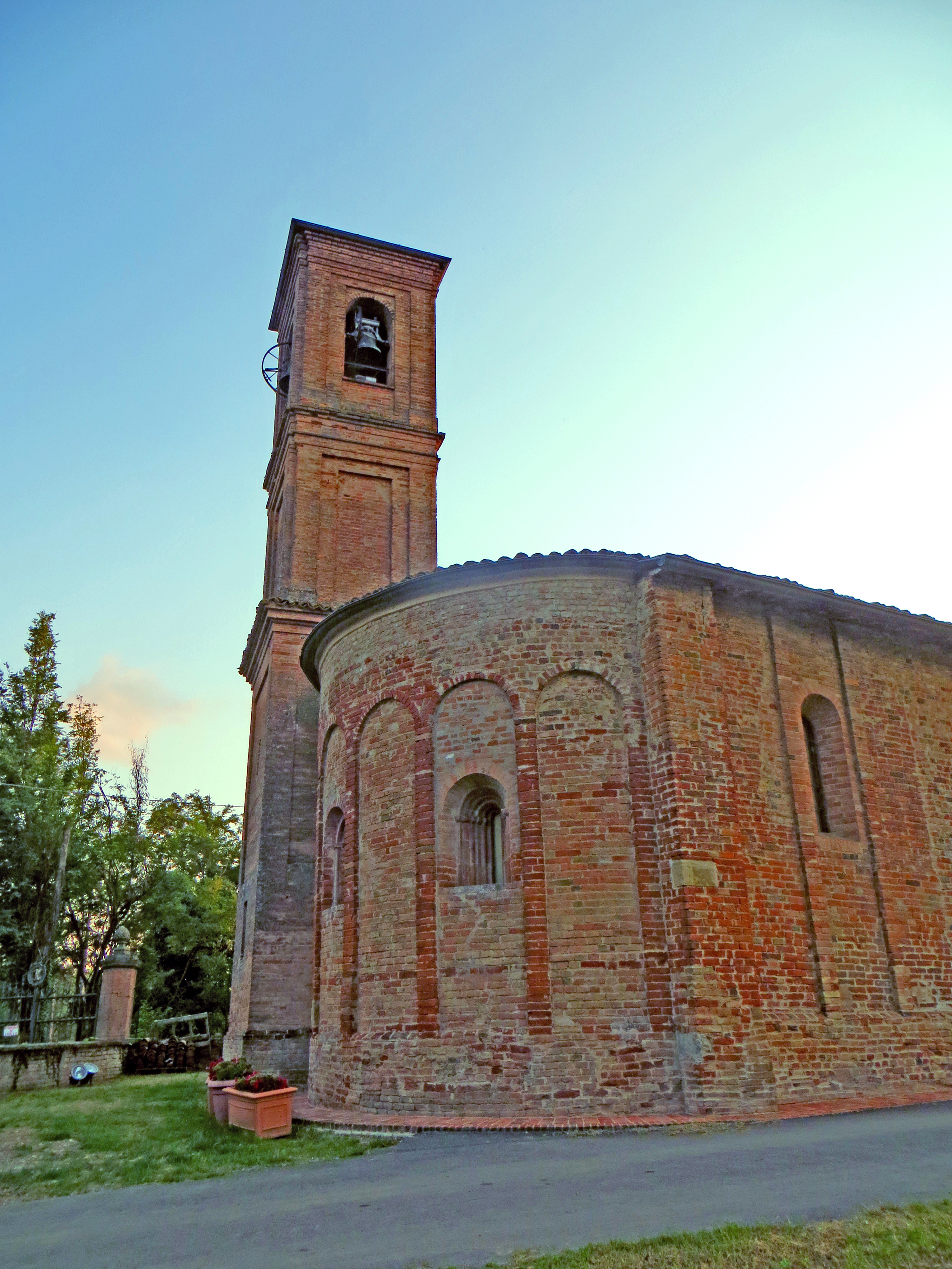 Chiesa di San Tommaso Becket (Cabriolo, Fidenza) - abside